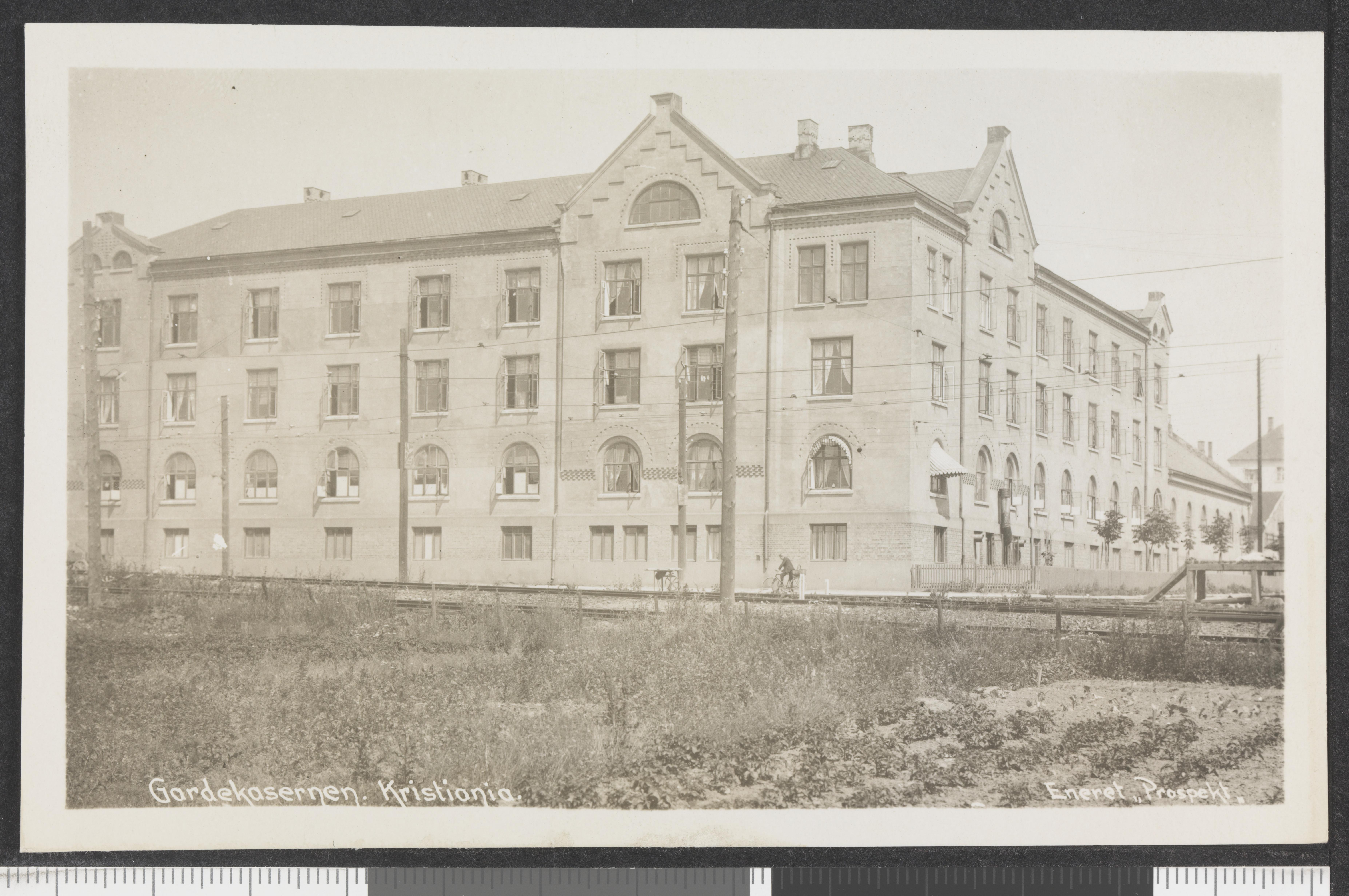 Bildet er hentet fra Nasjonalbibliotekets bildesamling Gardekasernen, Oslo, Oslo